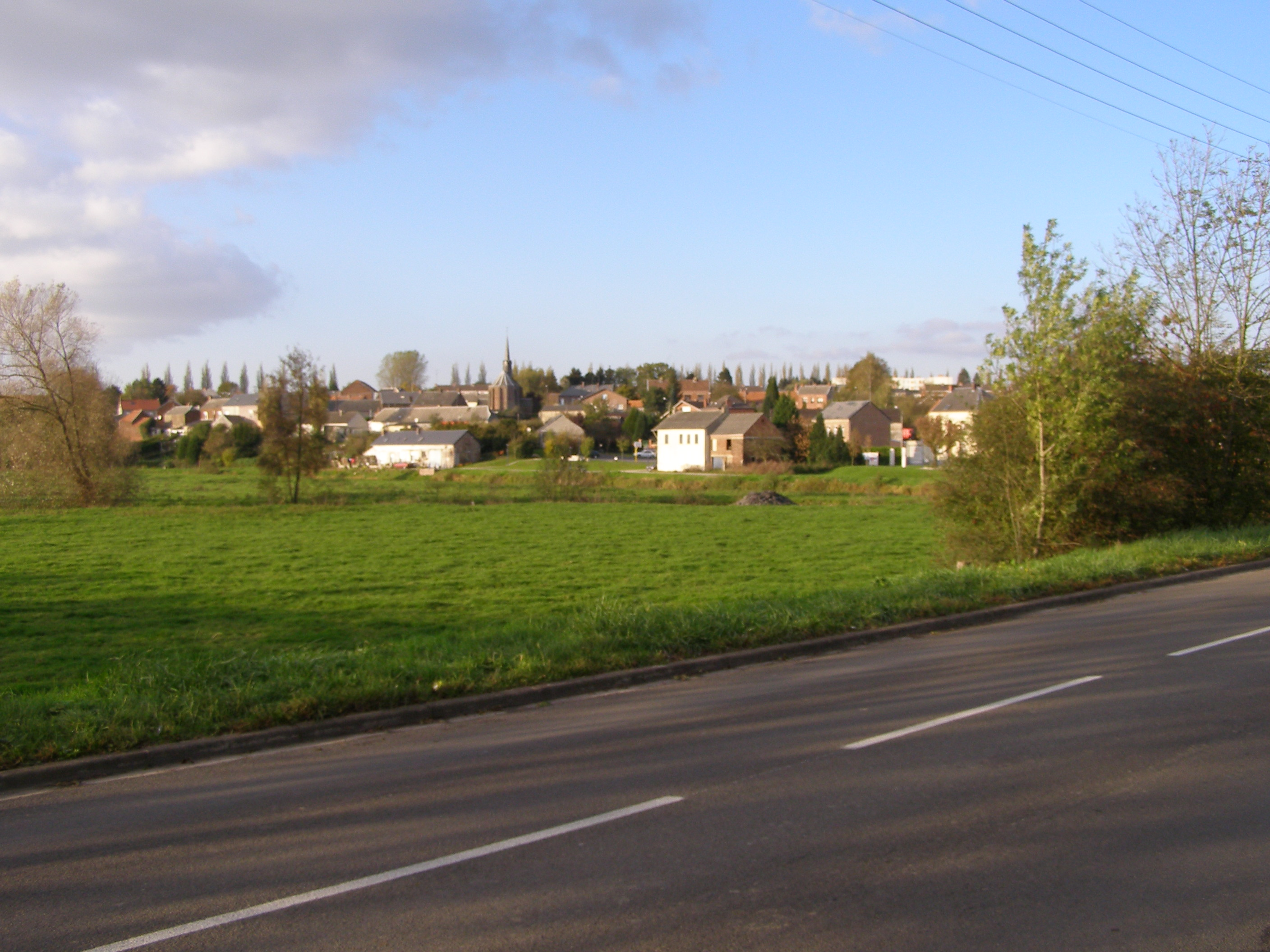 Vue d'ensemble du village.